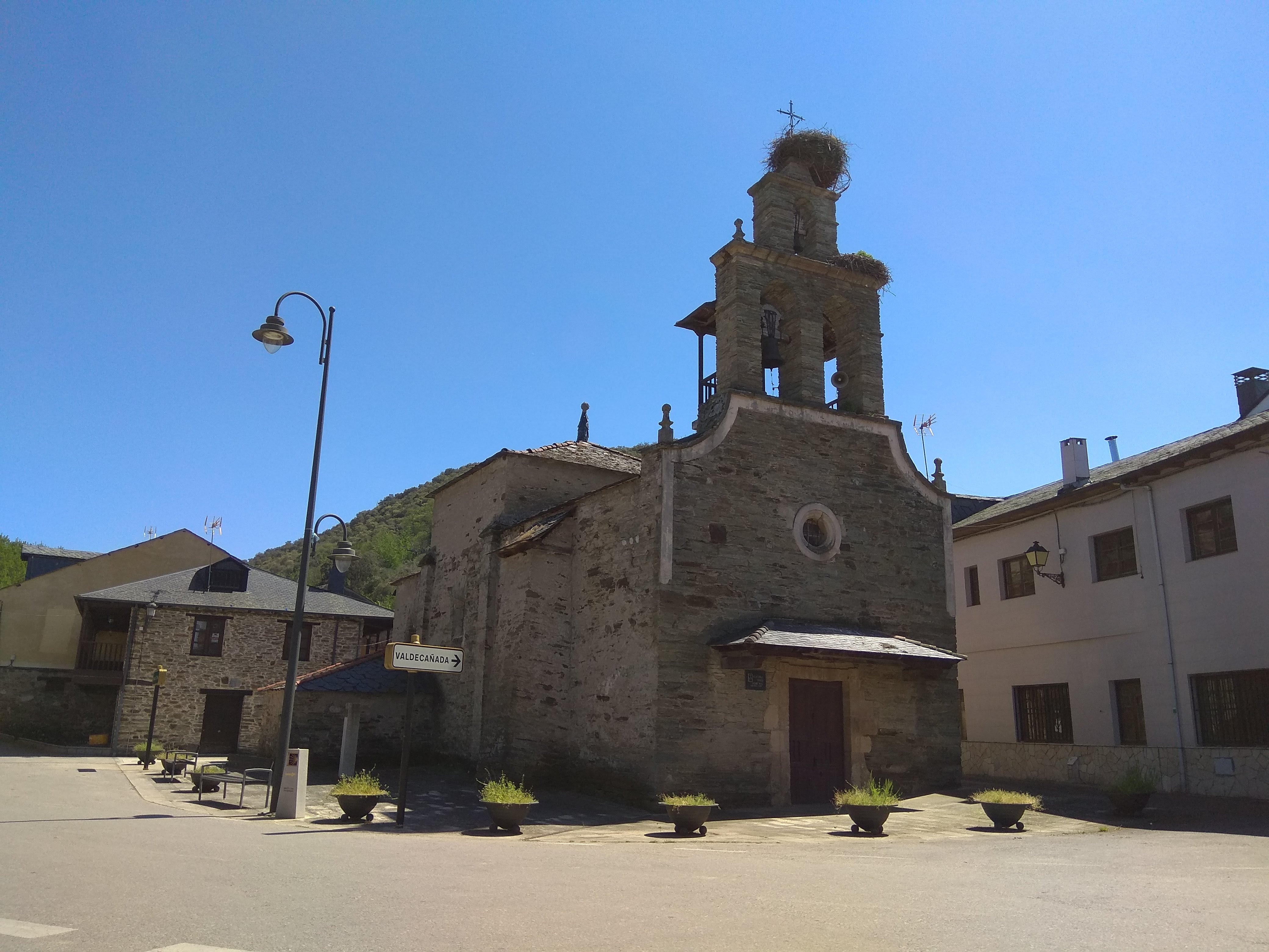 Foto frontal de la ermita